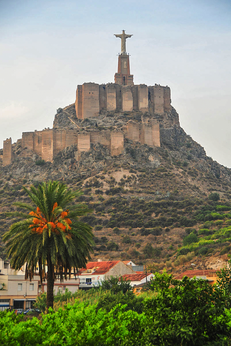 Castillo árabe de Monteagudo. El cristo fue añadido tras la guerra civil, antes existía otro que fue destruido. Tomada desde el pueblo de Monteagudo.